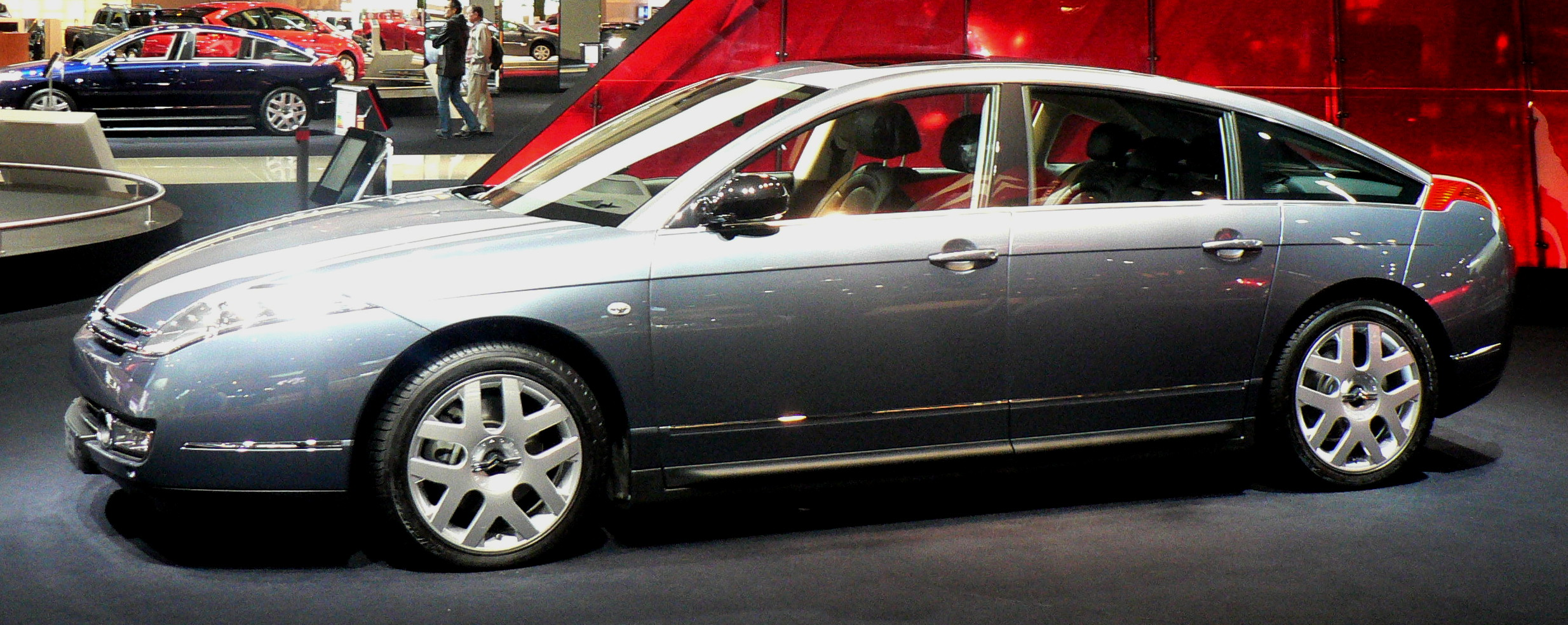 Mondial de l automobile de Paris (October 2006)